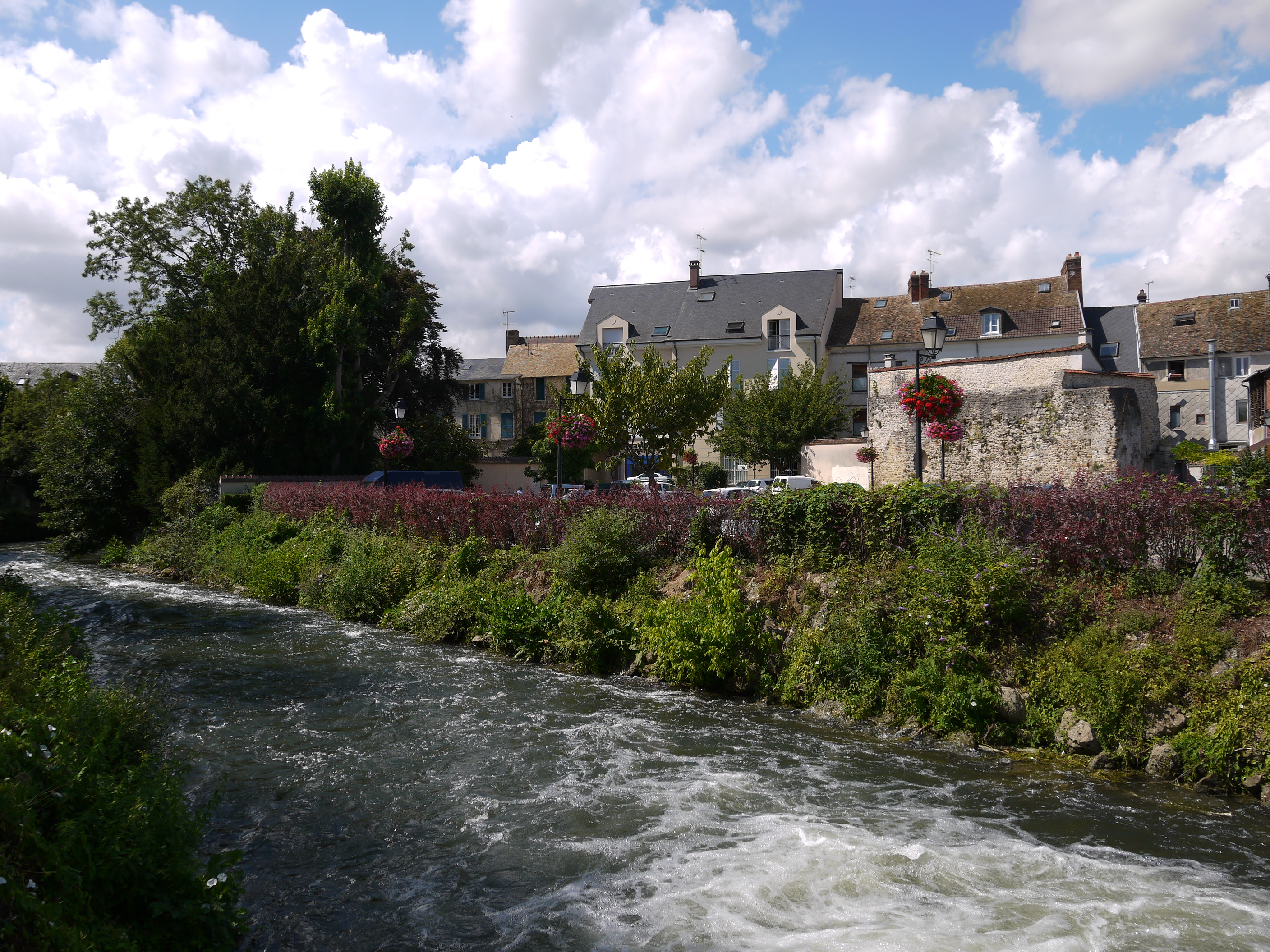 L'Eure à Pacy